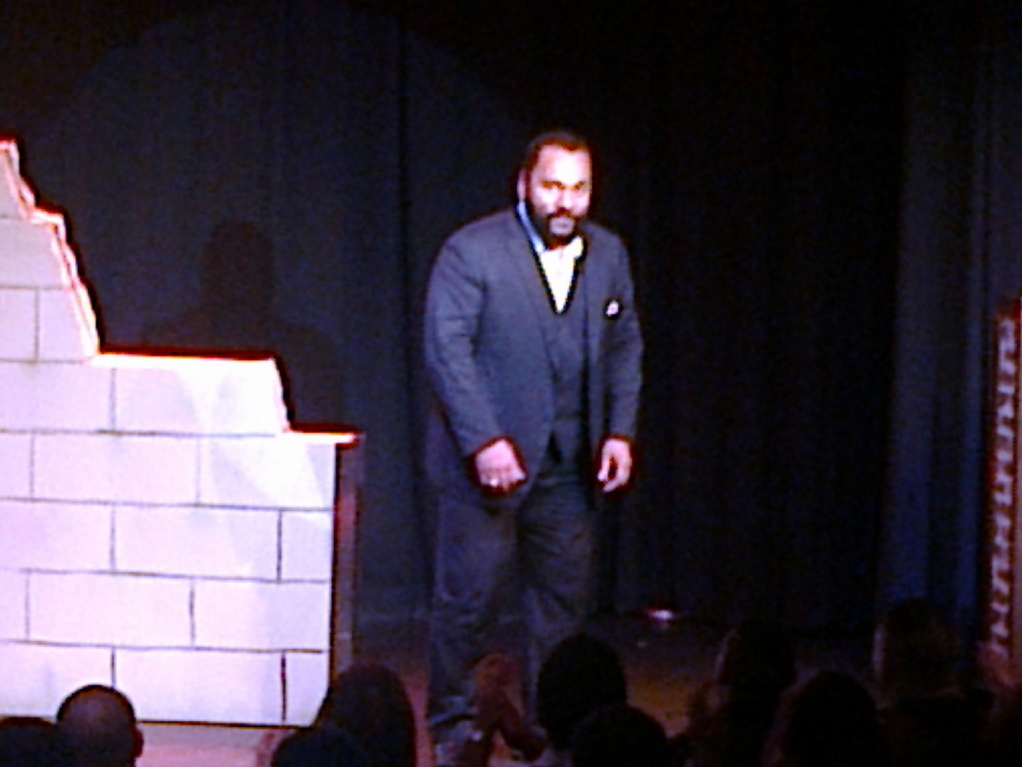 Dieudonné dans son spectacle "Le mur" au théâtre de la Main d'Or (Paris) en novembre 2013.